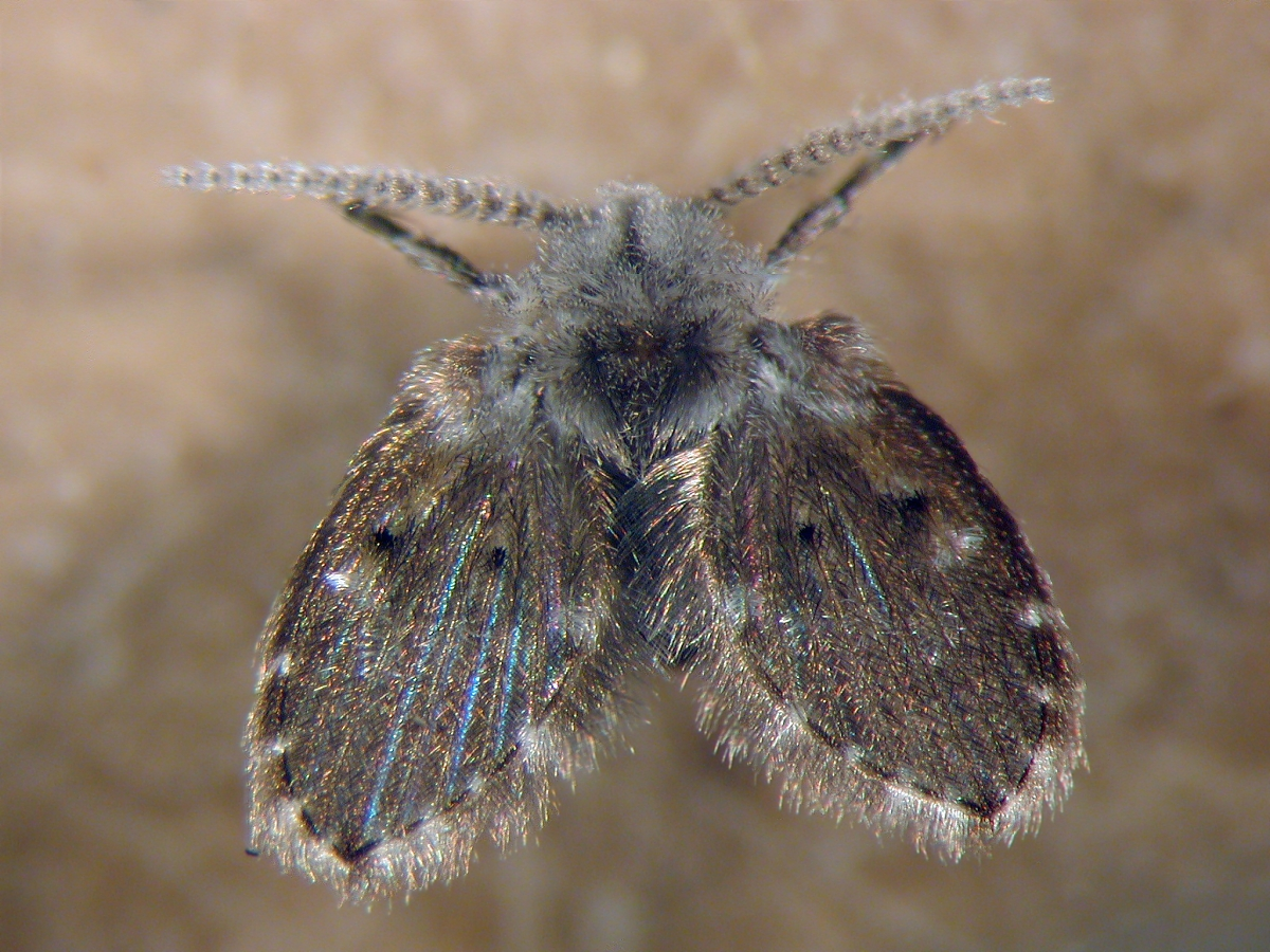 Psychodidae spec, Schwanheimer Düne, Frankfurt am Main, Hessen, Deutschland